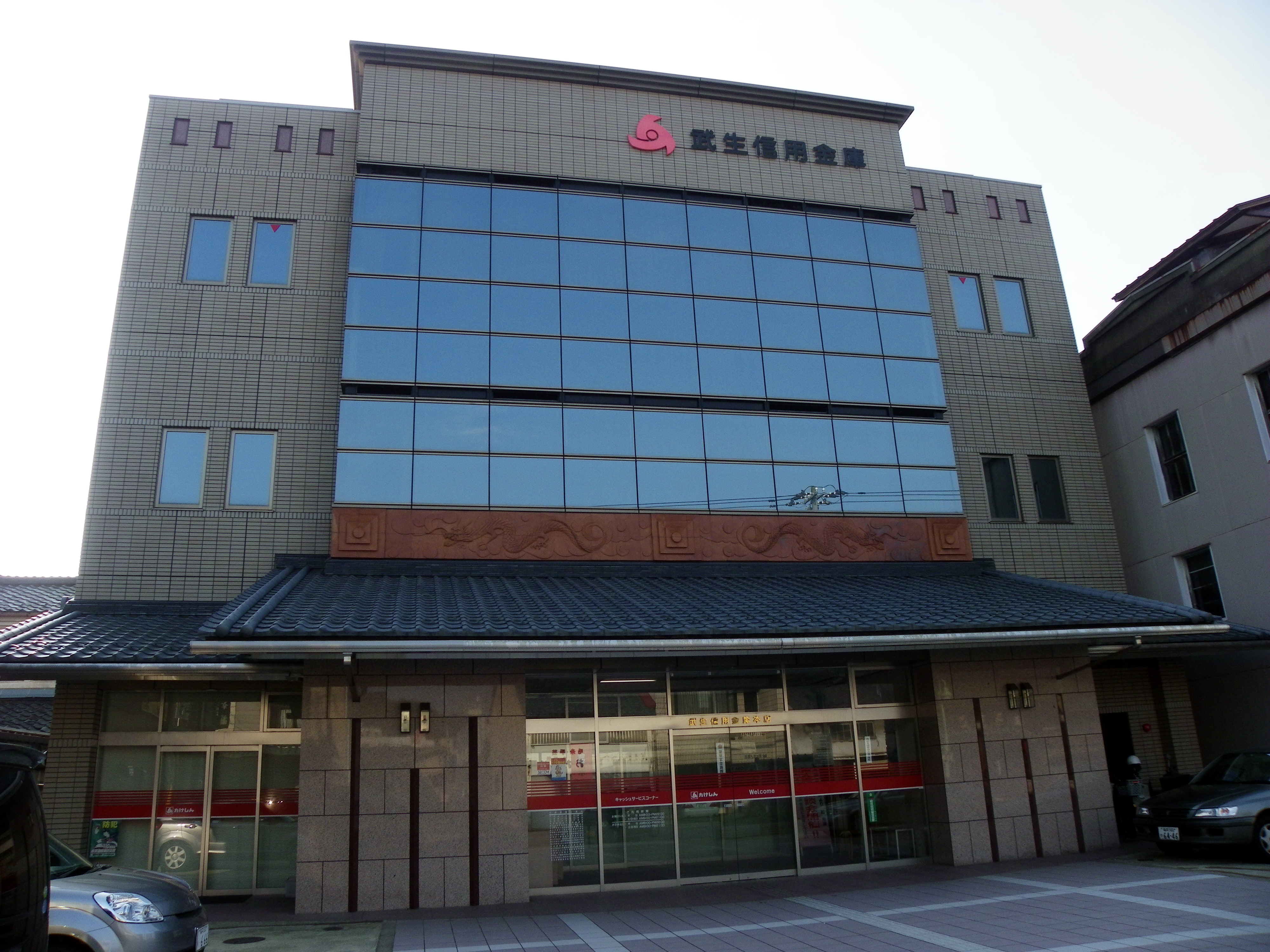 武生信用金庫本店